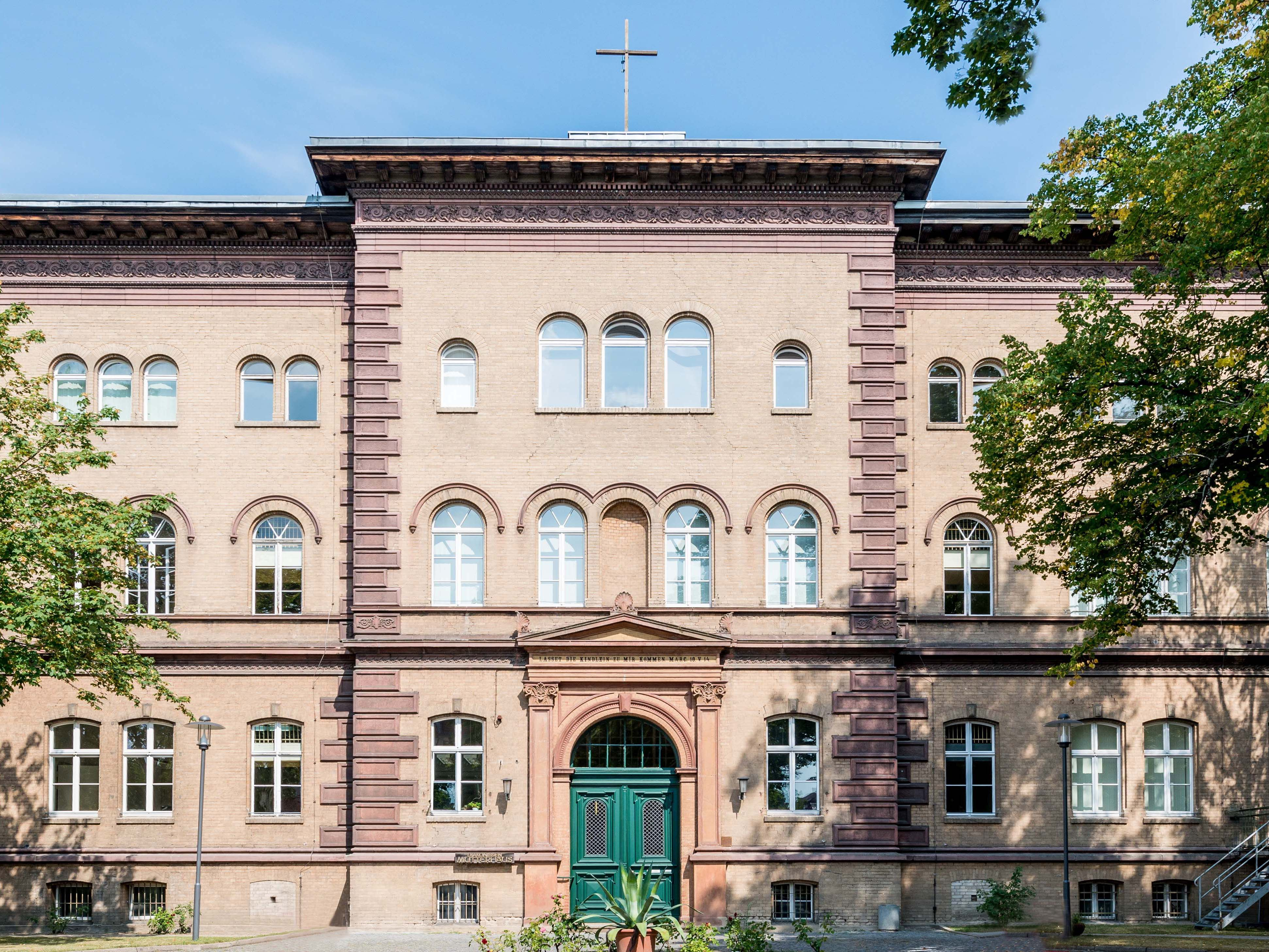 abgebildet ist das Diakonissen Mutterhaus auf dem Campus des Oberlinhaus in Potsdam-Babelsberg.